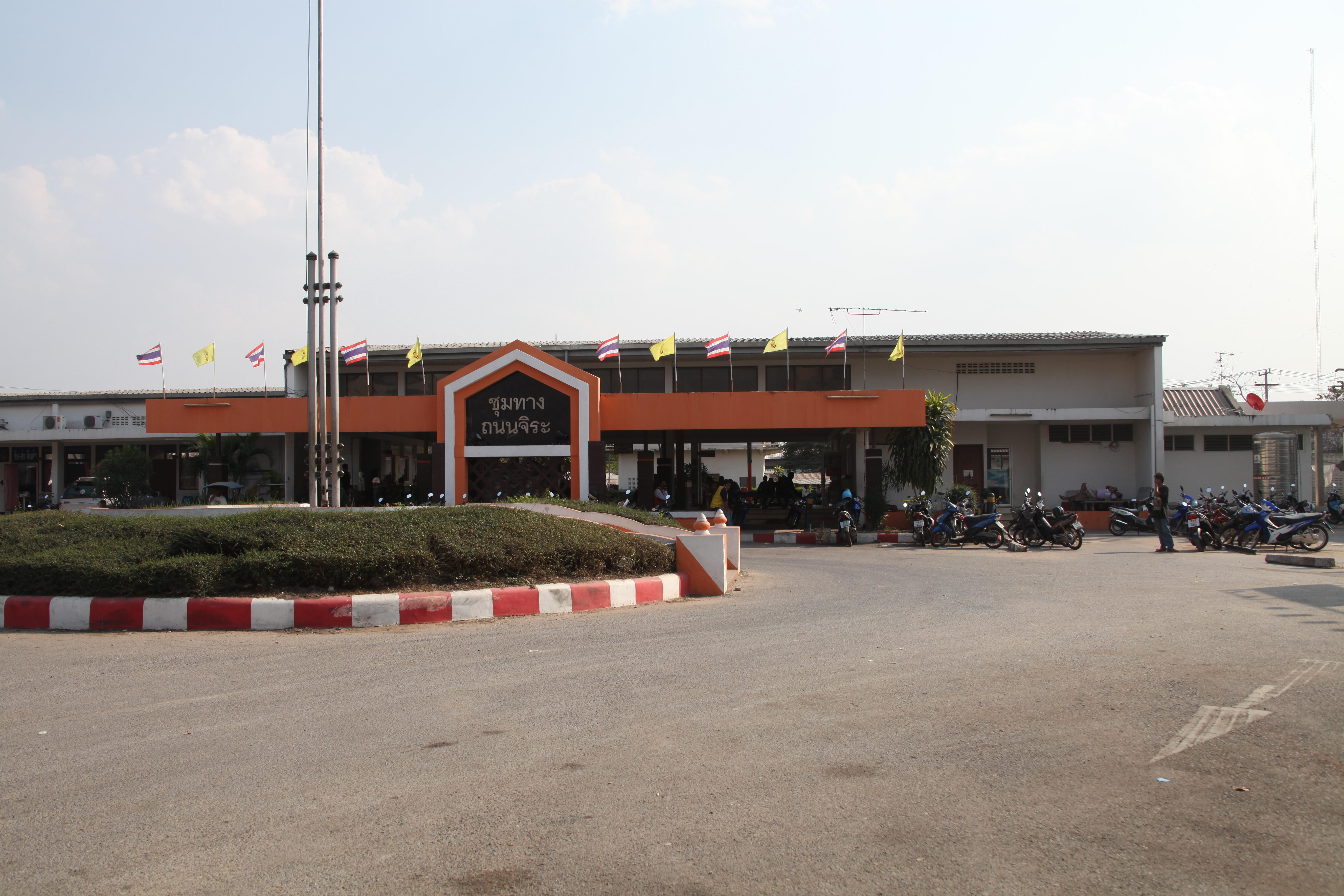 タノンチラ駅